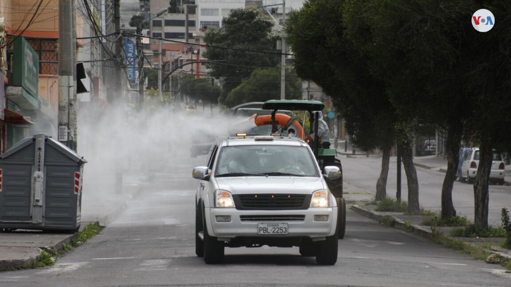 Quito, limpieza contra COVID-19